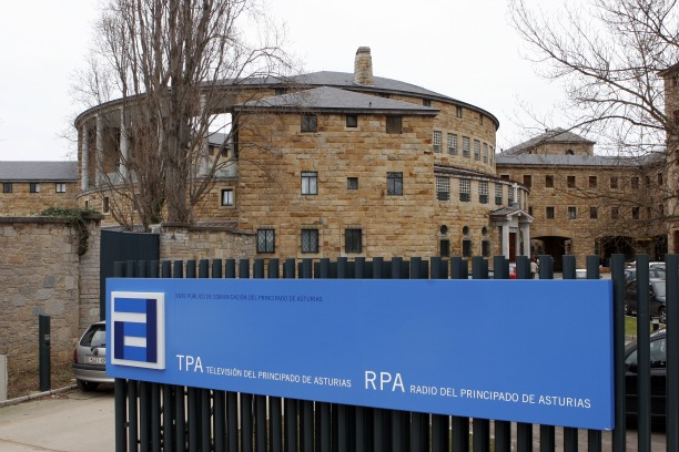 Instalaciones del Ente Público de Comunicación del Principado de Asturias y sus sociedades, TPA, RPA. Antiguo convento de las Clarisas, Laboral, Ciudad de la Cultura, Gijón.